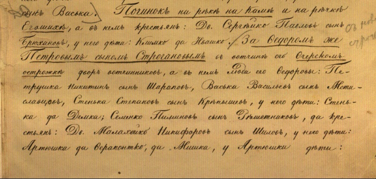 Фрагмент из копии переписной книги Елизарова 1647 года с упоминанием «починка на реке Каме и на речке Егошиха».